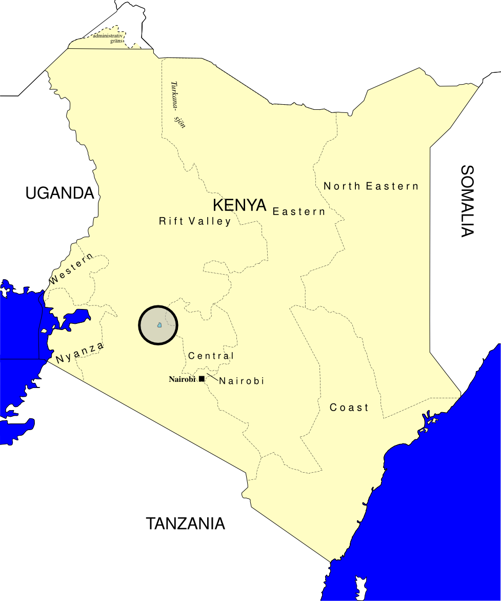 Nakurusjöns läge i Kenya